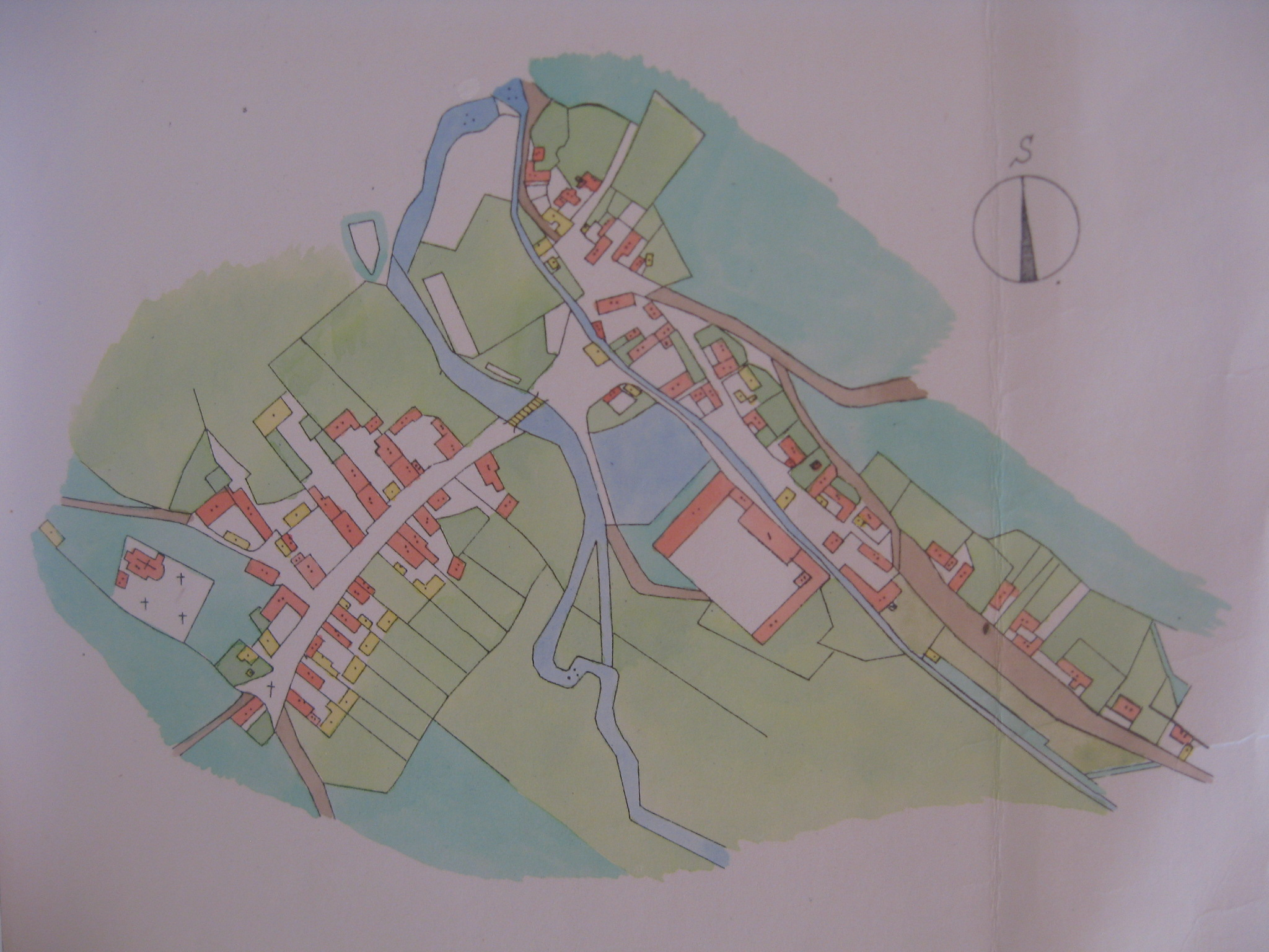 Česky: Minice v roce 1843